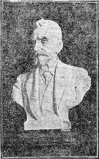 Fabio Stecchi (1855-1928), Joseph Durandy, 1908, buste en marbre, anciennement au siège de la Compagnie du gaz et de l'électricité de Nice, 23 rue Notre-Dame, localisation actuelle inconnue. Photographie parue dans Le Petit Niçois du 29 novembre 1908.